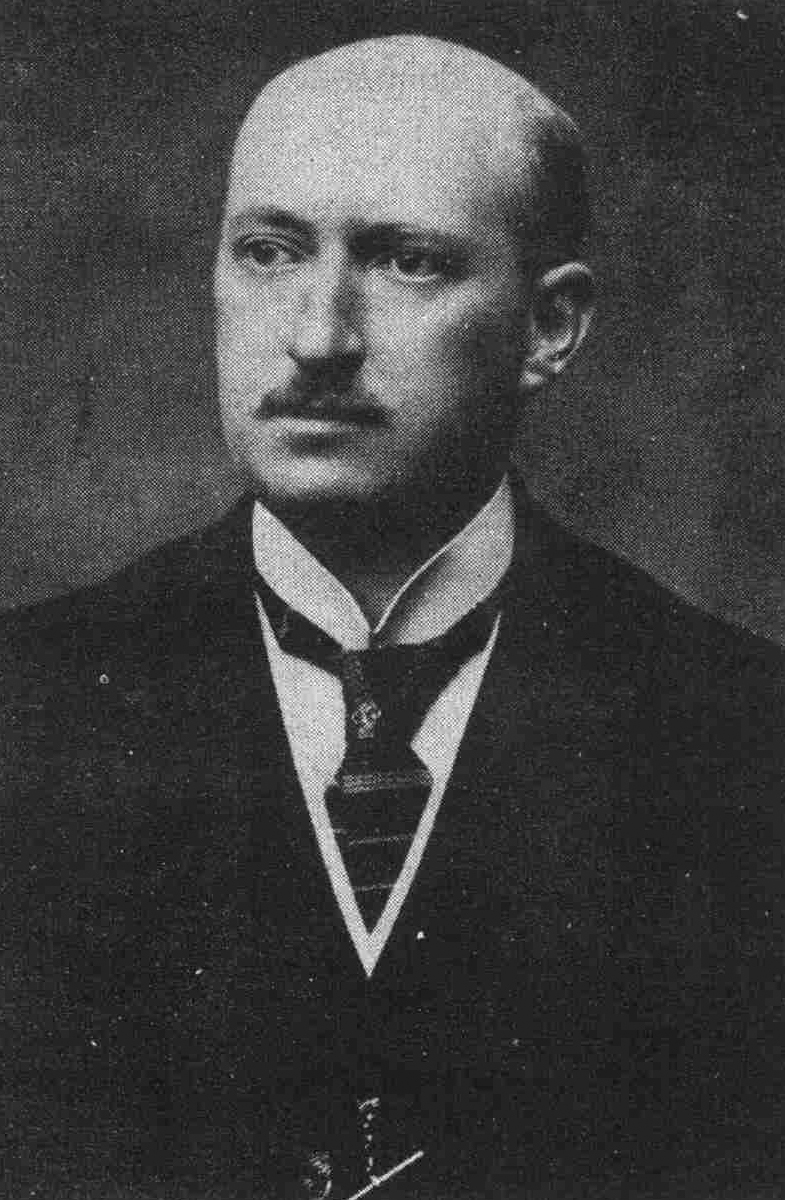 Henri Schintgen †